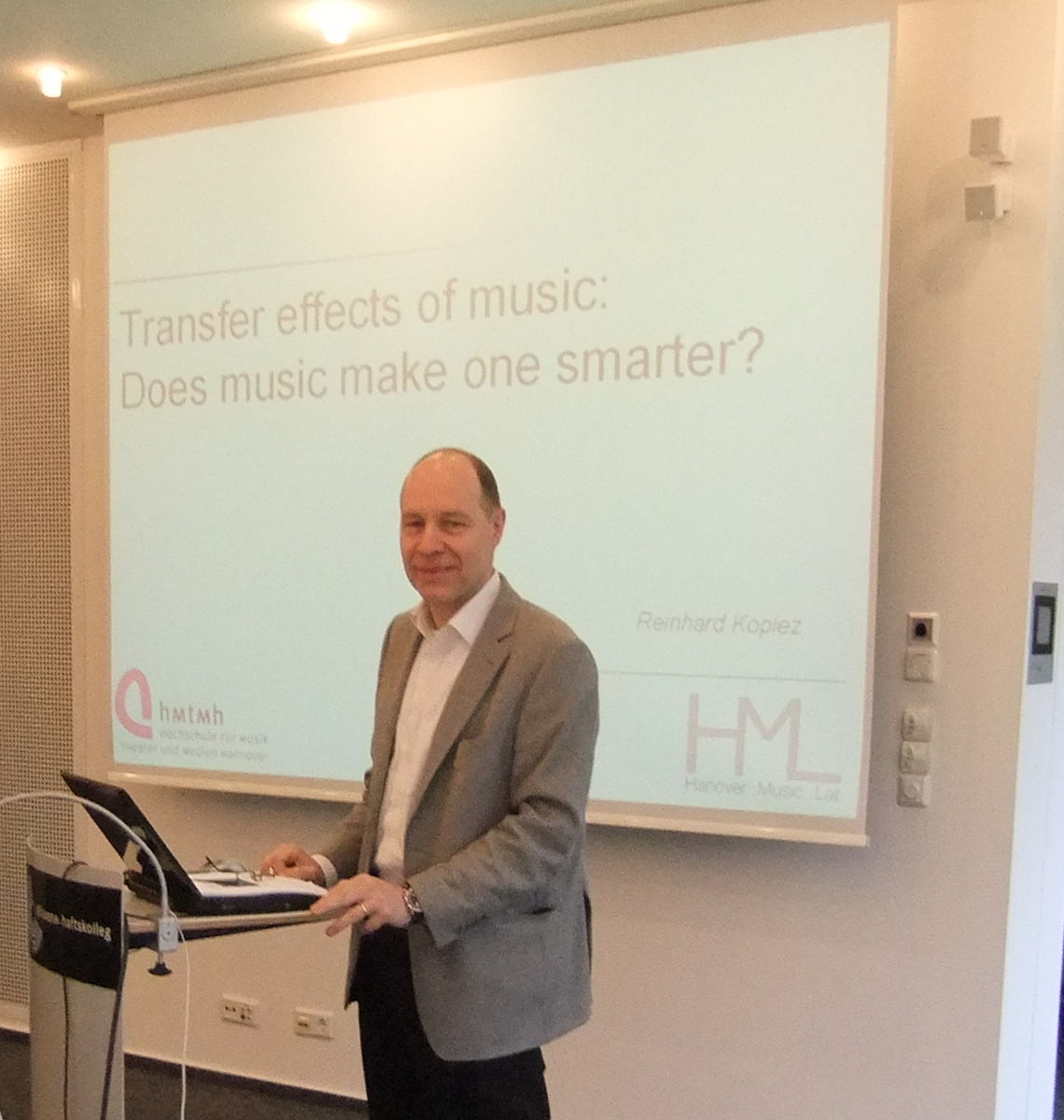 Foto